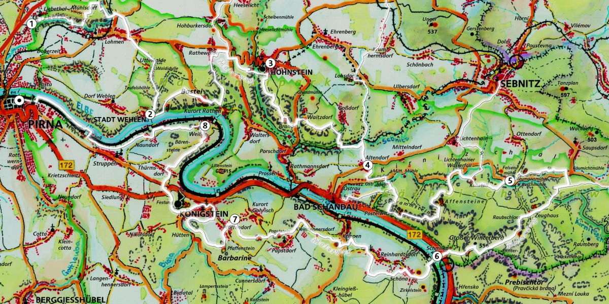 Karte Malerweg (Sächsische Schweiz). Liebethaler Grund Stadt Wehlen Hohnstein Altendorf Neumannmühle Elbüberquerung bei Schmilka Pfaffendorf Weißig / Oberrathen Pirna